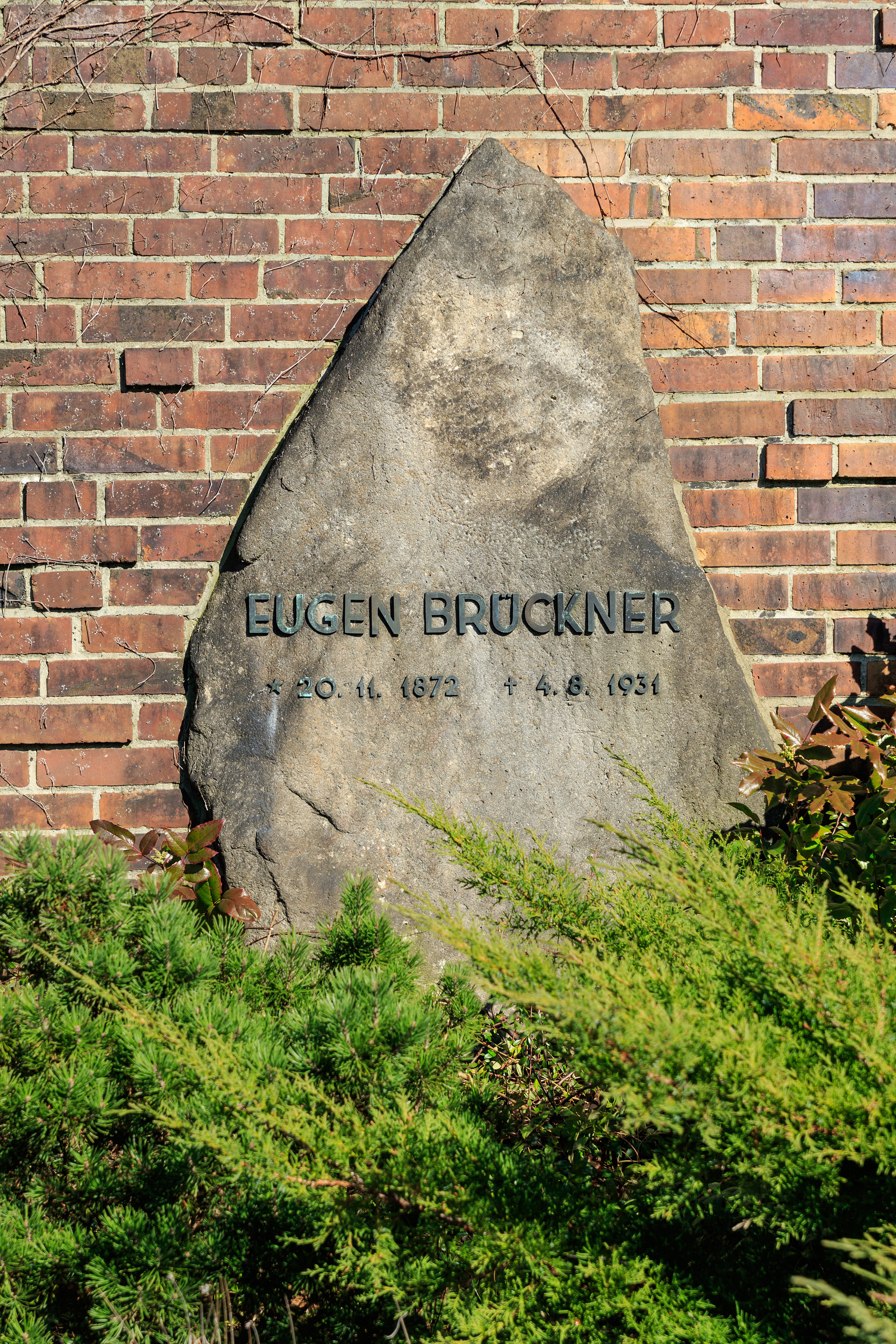 Zentralfriedhof Friedrichsfelde, Berlin-Lichtenberg. Gedenkstätte der Sozialisten, Grab von Eugen Brückner.